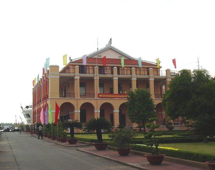 Bến Nhà Rồng